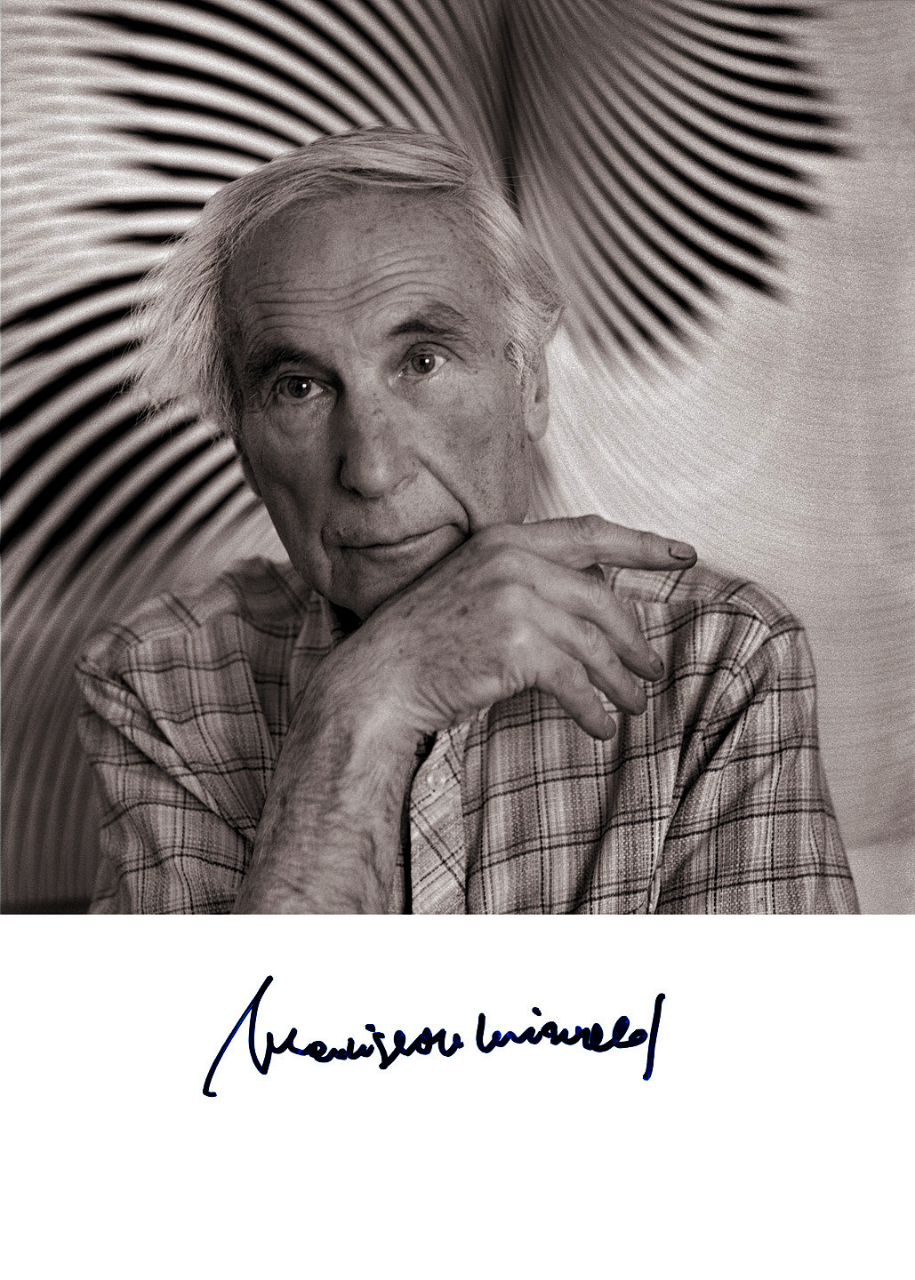 Jiří Jiroutek´s picture Cyklus: Osobnosti